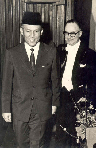 Mariano Drago con el Sr. Embajador Indonesio en la Argentina, durante el acto "Homenaje a Indonesia", donde recibe un presente talla en madera "La Cultura de Indonesia a La Amistad Argentina con el País". 1965.